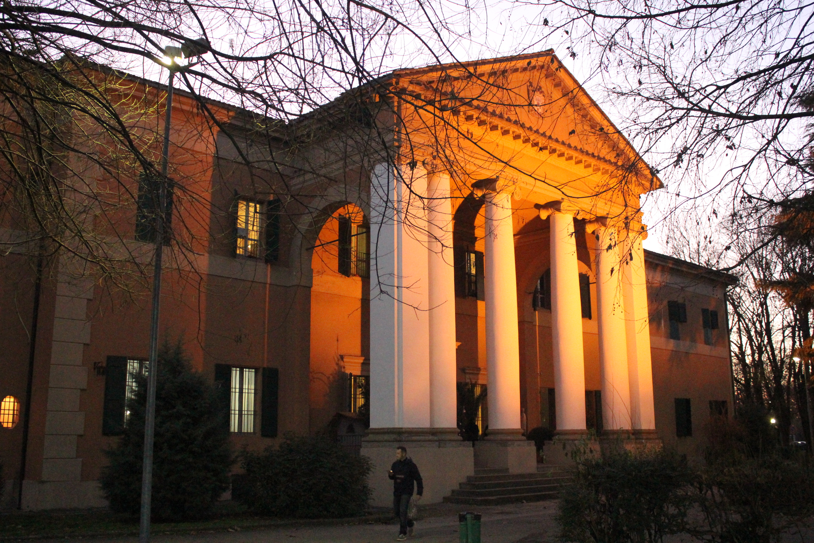 Vista del pronao della villa neoclassica appartenuta ai conti Pallavicini, Borgo Panigale, Bologna, Italy